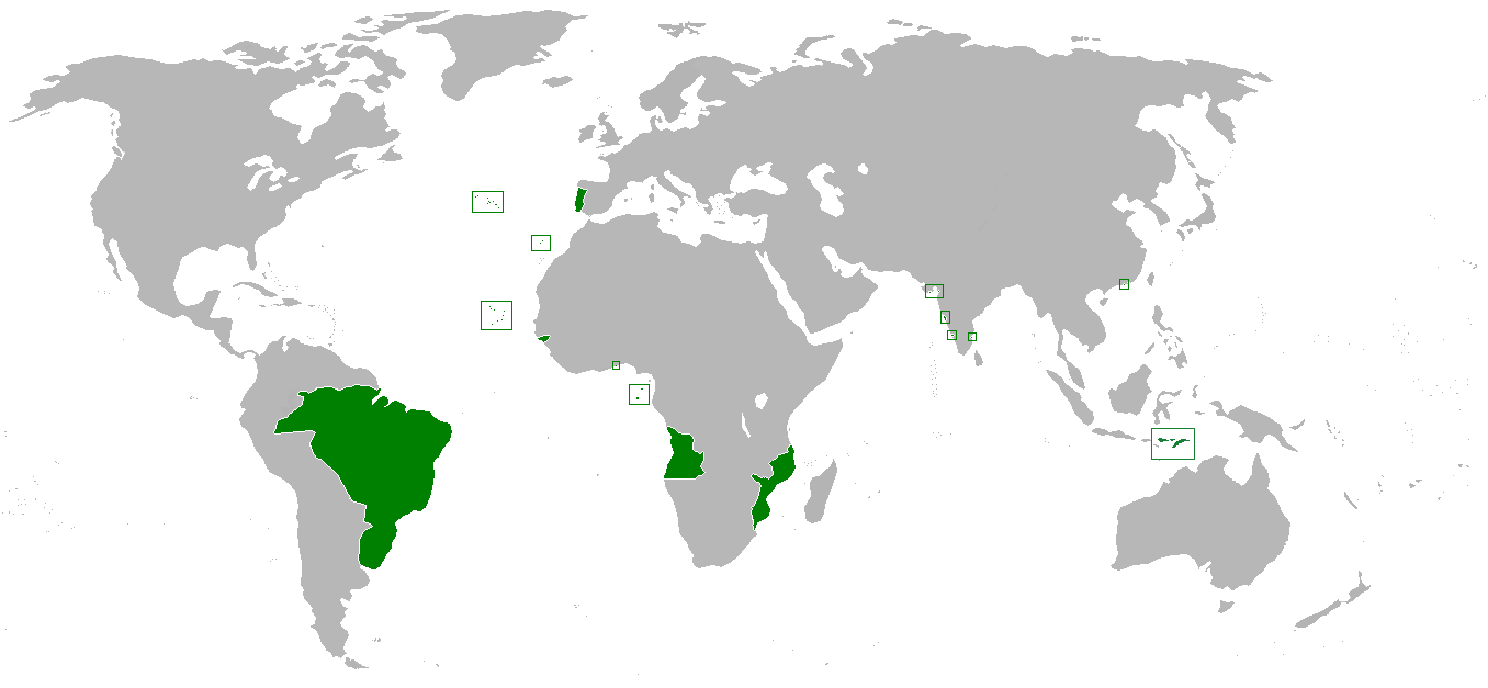 Império Português no início do século XIX